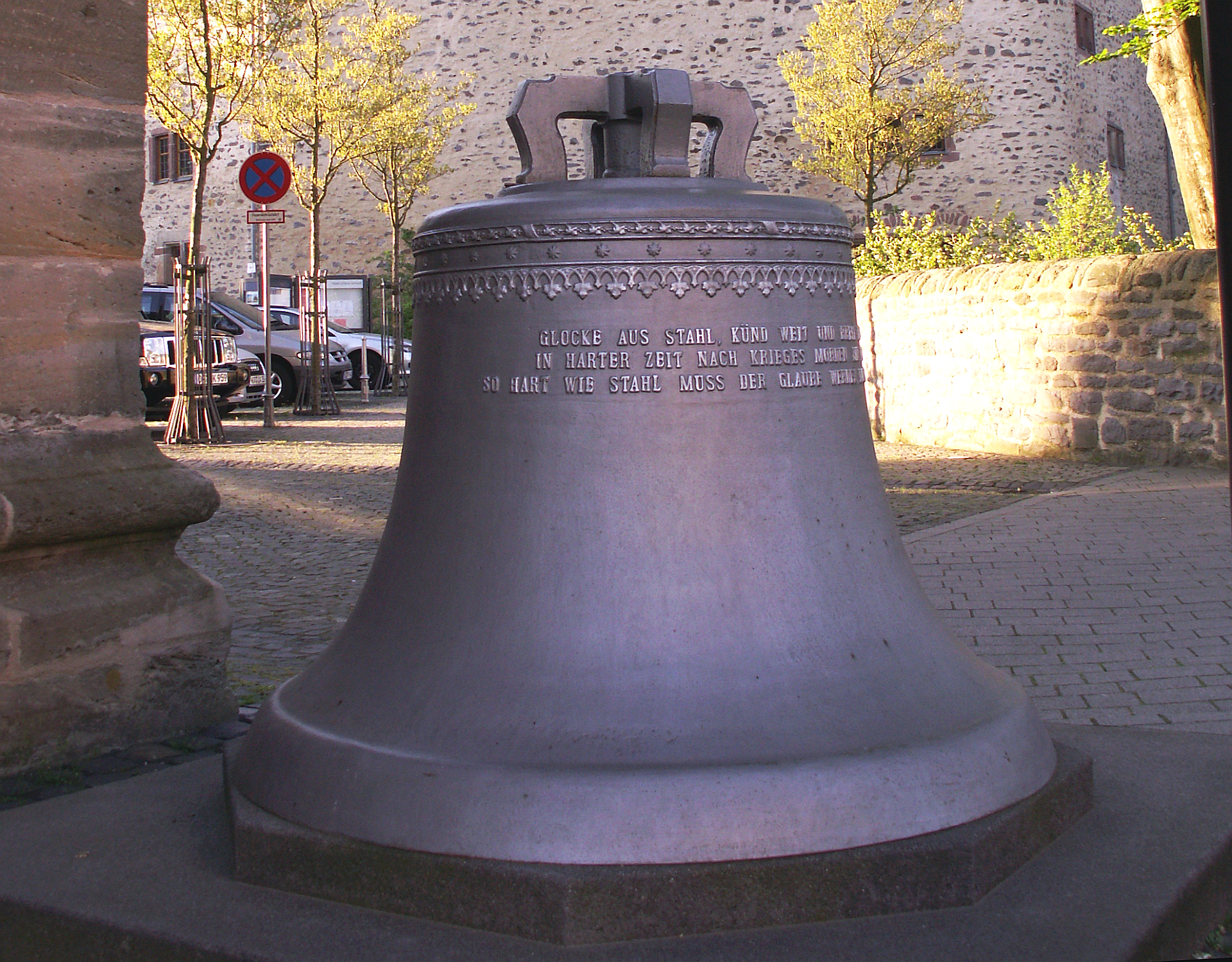 Einst Glocke für die Schlosskirche Datum Ostern 1929 mit Kriegsende-Widmung Erster Weltkrieg - Stahlglocke im Schlosshof von Schloss Romrod Hessen Germany - Foto 2008 Wolfgang Pehlemann PICT0148